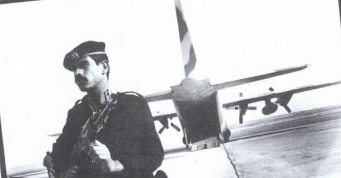 פיגוע האוטובוס במצרים (1990) - ההרקולס הישראלי נשמר ע׳׳י חייל מצרי בשדה התעופה של קהיר.